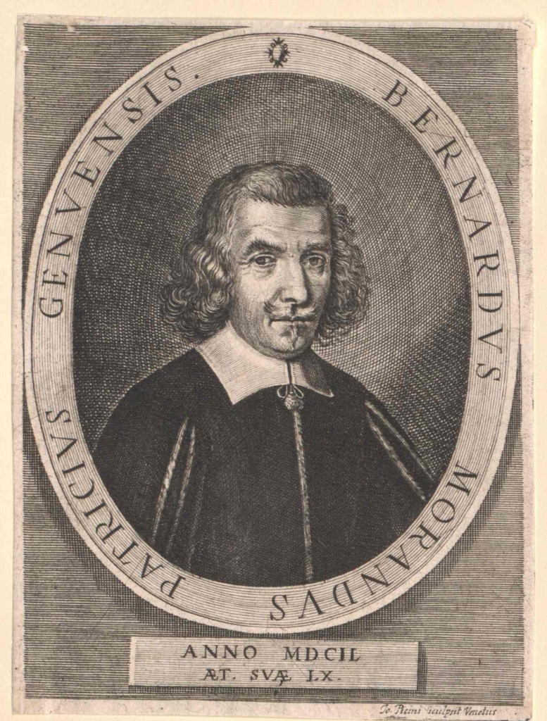 Bernardo Morando